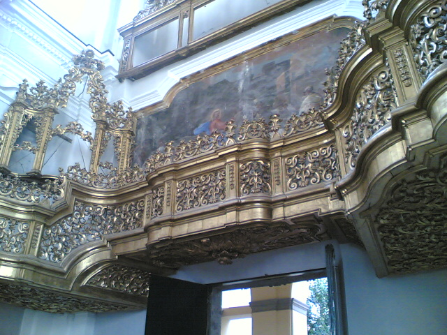 Coro Chiesa S. Maria Donnalbina, Napoli